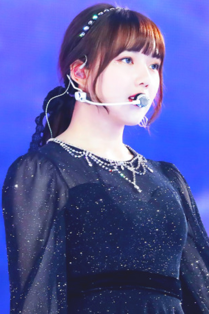 Jung Yerin na 33ª edição anual do Golden Disc Awards, em 5 de janeiro de 2019